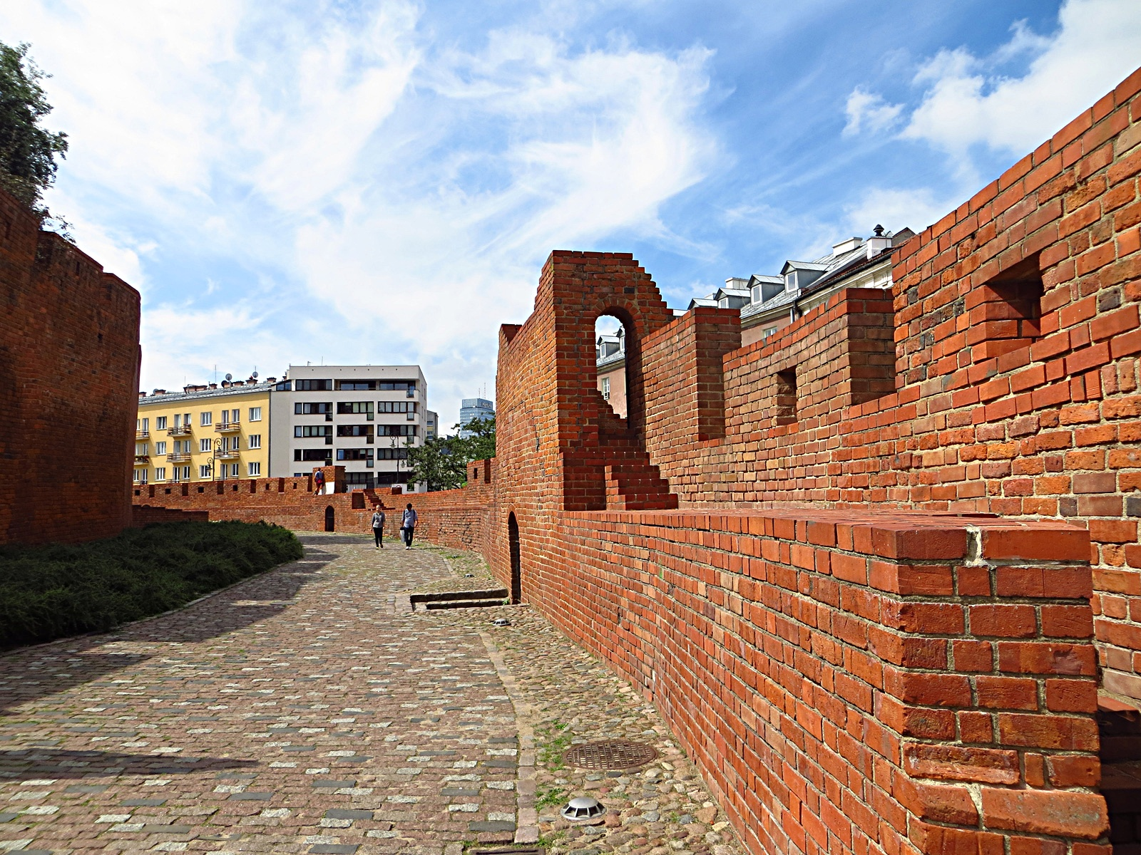 Barbakan Warszawski